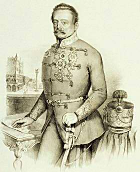 Melchiorre Fontana, "Ritratto del generale Kazimierz Gorzkowski", litografia.